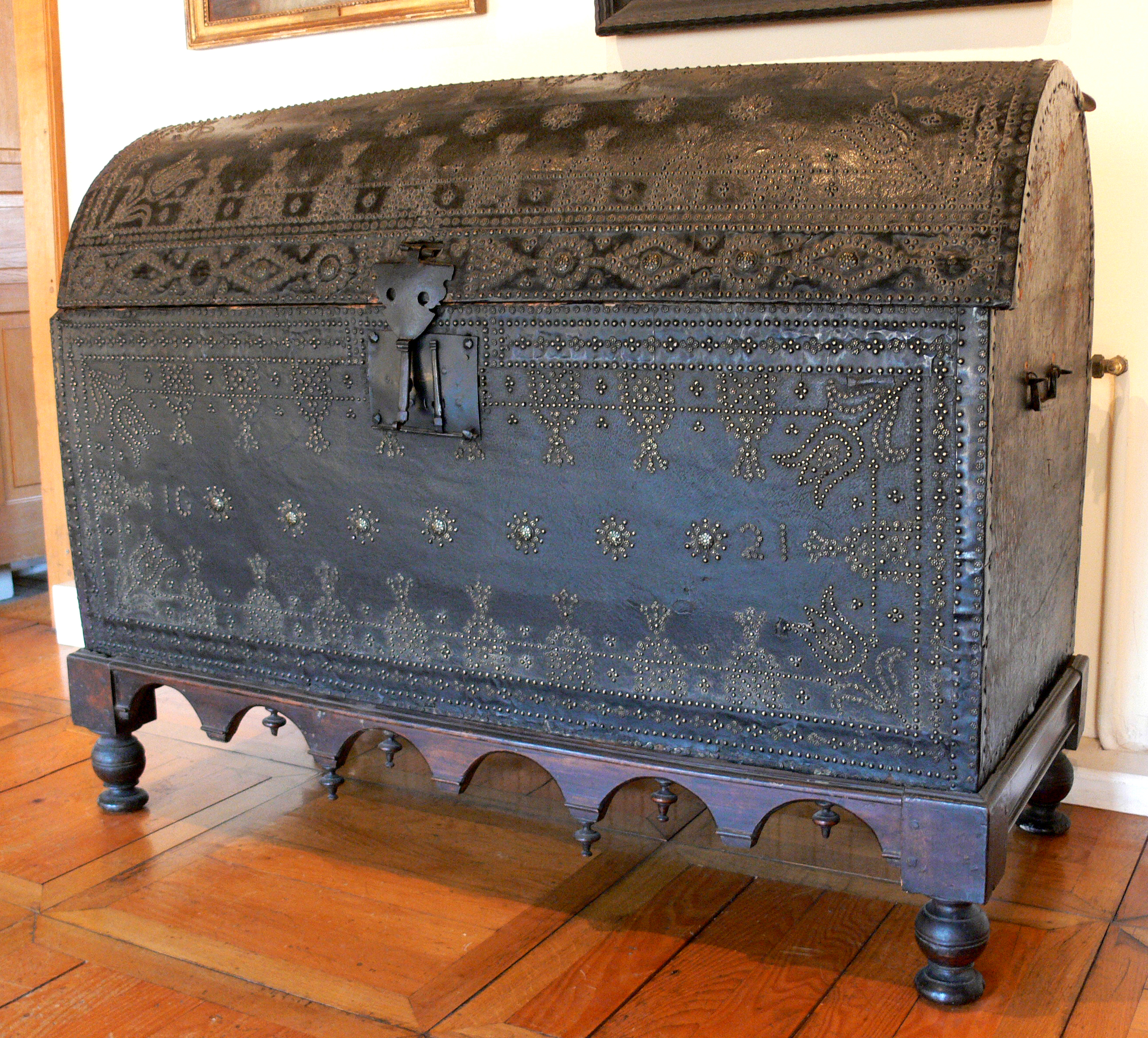 Malle ou coffre de mariage du type bahut (à couvercle bombé) couverte de cuir et décorée de clous, datée de 1621. Vesoul, musée Georges-Garret, 005.0.73, legs Dyverneresse, 1981.